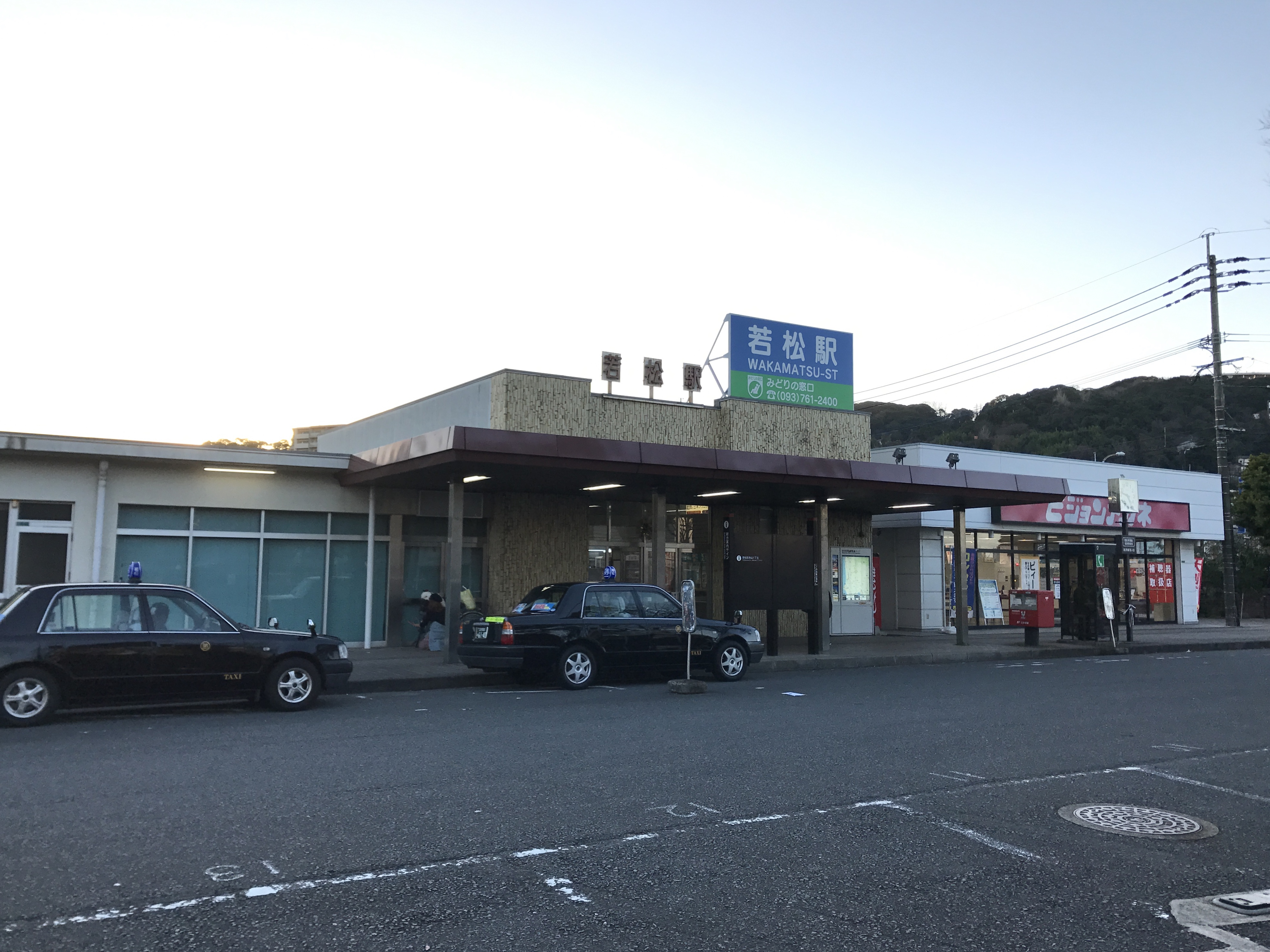 若松駅駅舎